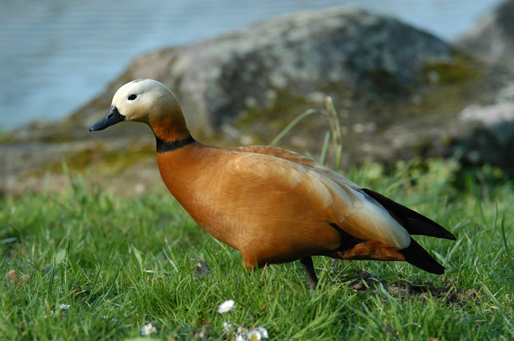 Männliche Rostgans (Tadorna ferruginea) im Schwetzinger Schlossgarten